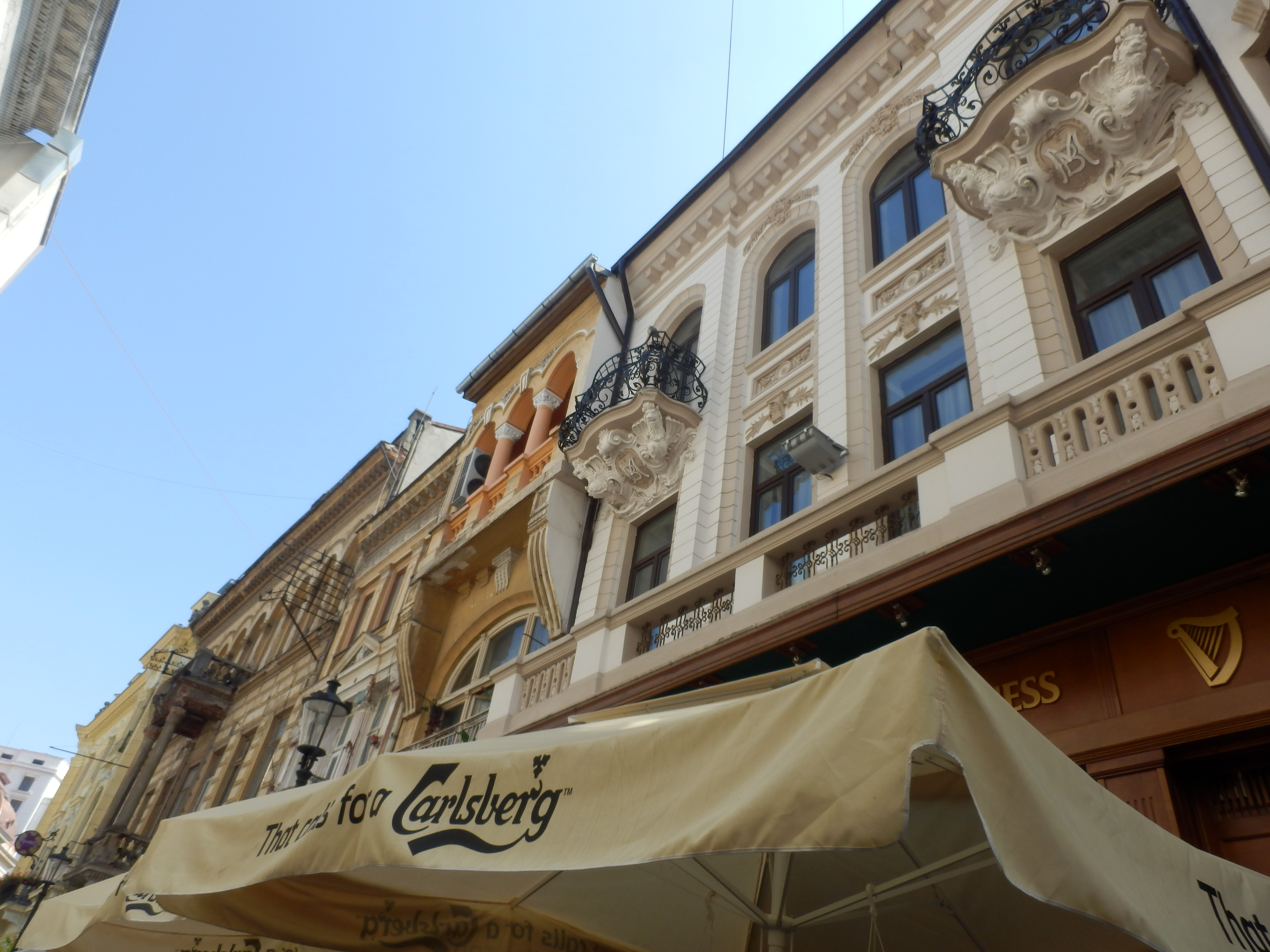 Bucharest, Romania